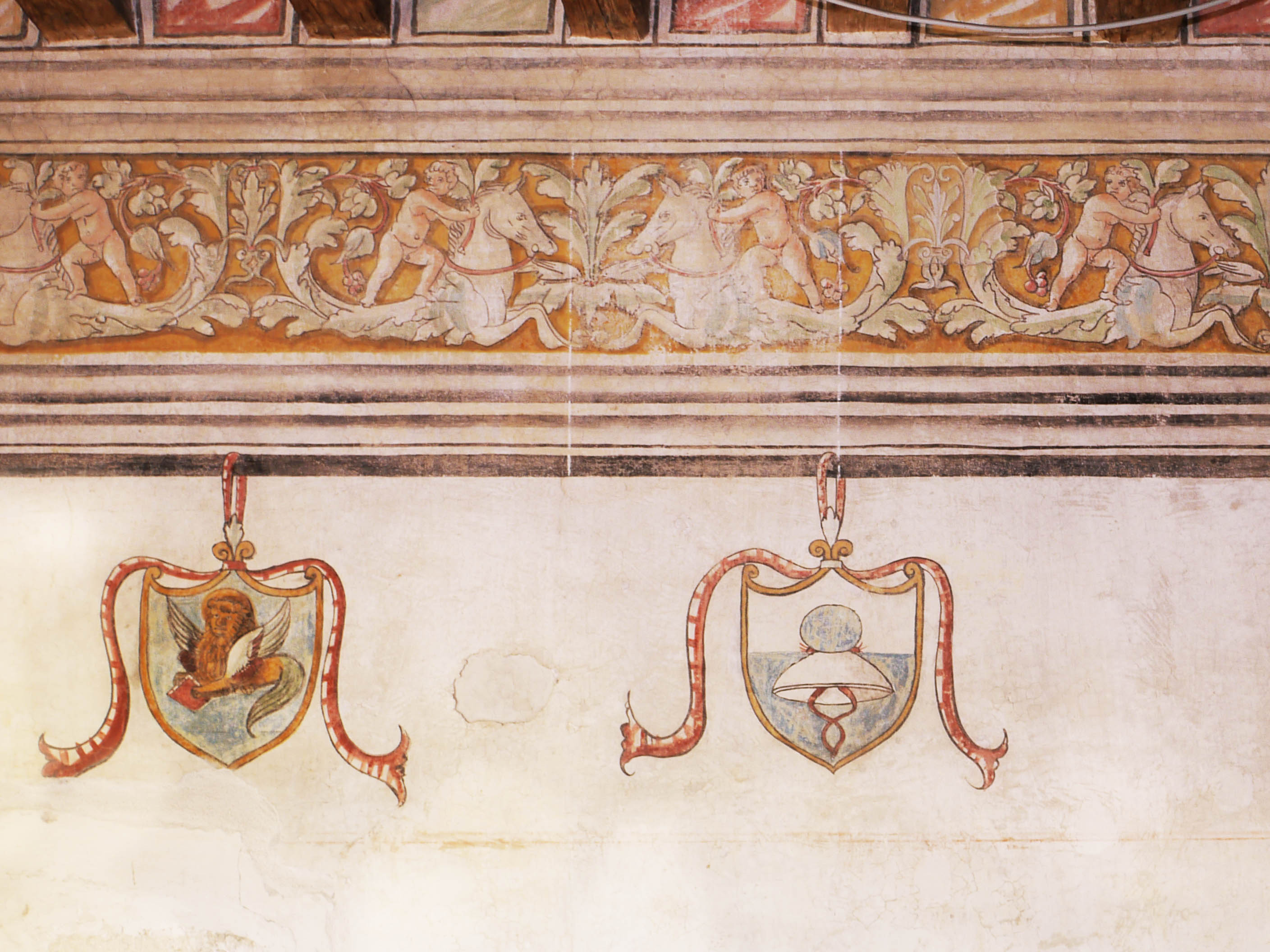 Ca' Cappello (XV sec), Affresco stemmi - Meolo (VE)